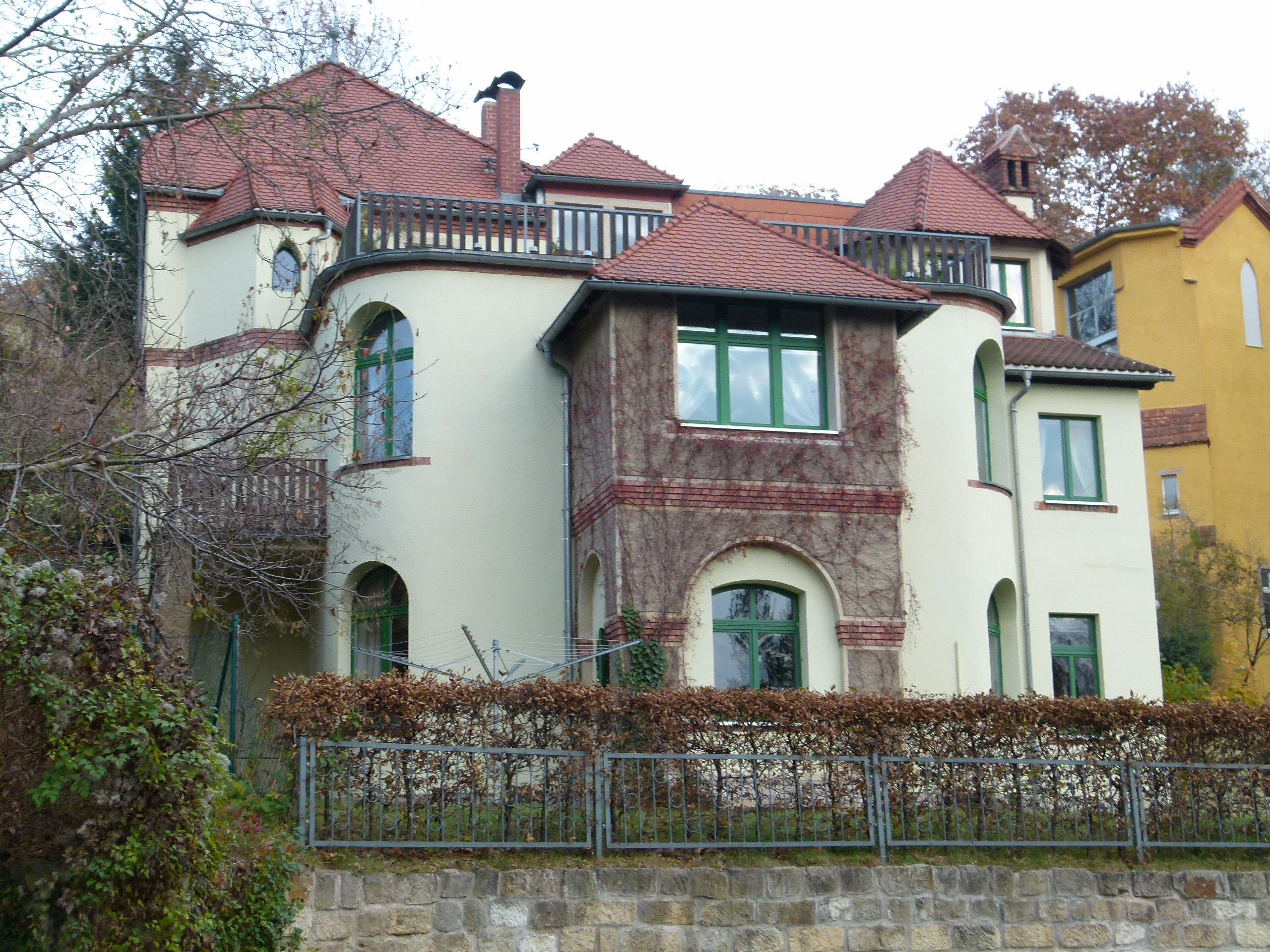 Denkmalgeschütztes Haus (kleines Künstlerhaus), Pillnitzer Landstraße 57, Loschwitz, Dresden, Architekt: Martin Pietzsch.